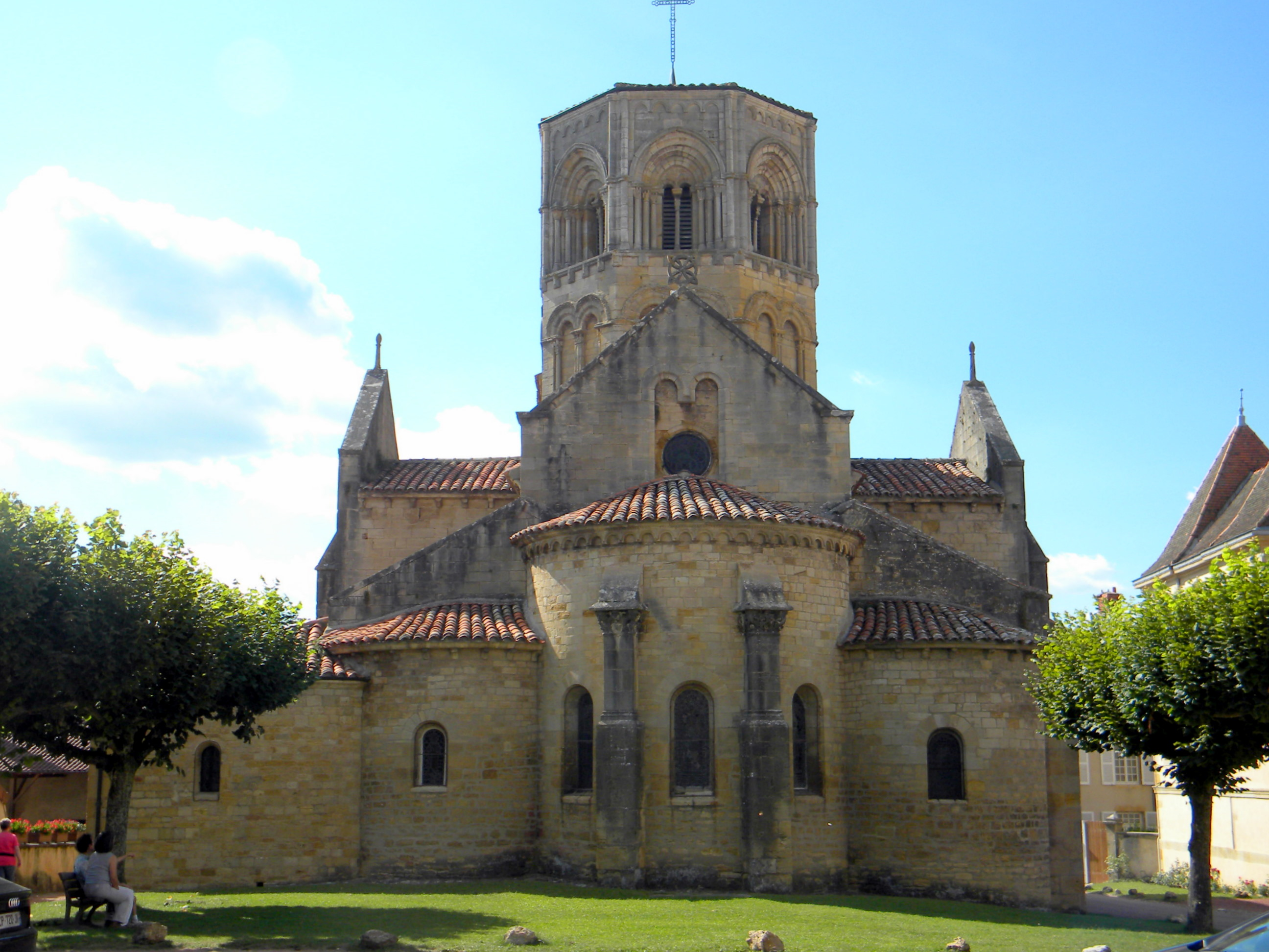 Chevet de l'église Saint-Hilaire de Semur-en-Brionnais